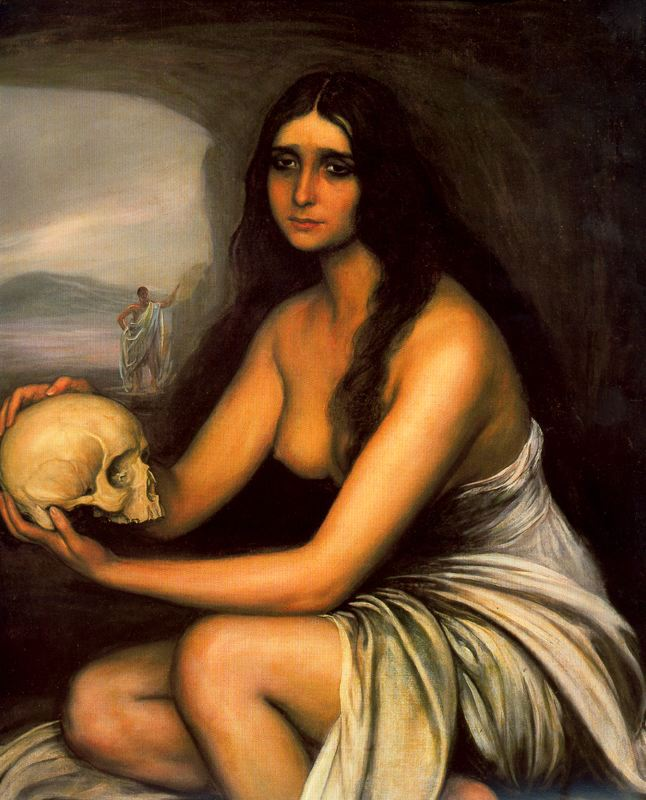 Magdalena. 1920. Óleo sobre lienzo. 56 x 79 cm. Museo Julio Romero de Torres, Córdoba, (España).